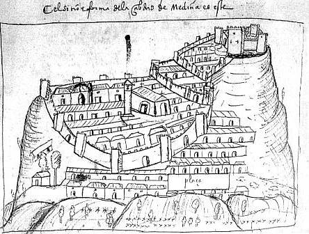 Dibujo de Pedro Barrantes Maldonado en el manuscrito Ilustraciones de la Casa de Niebla.